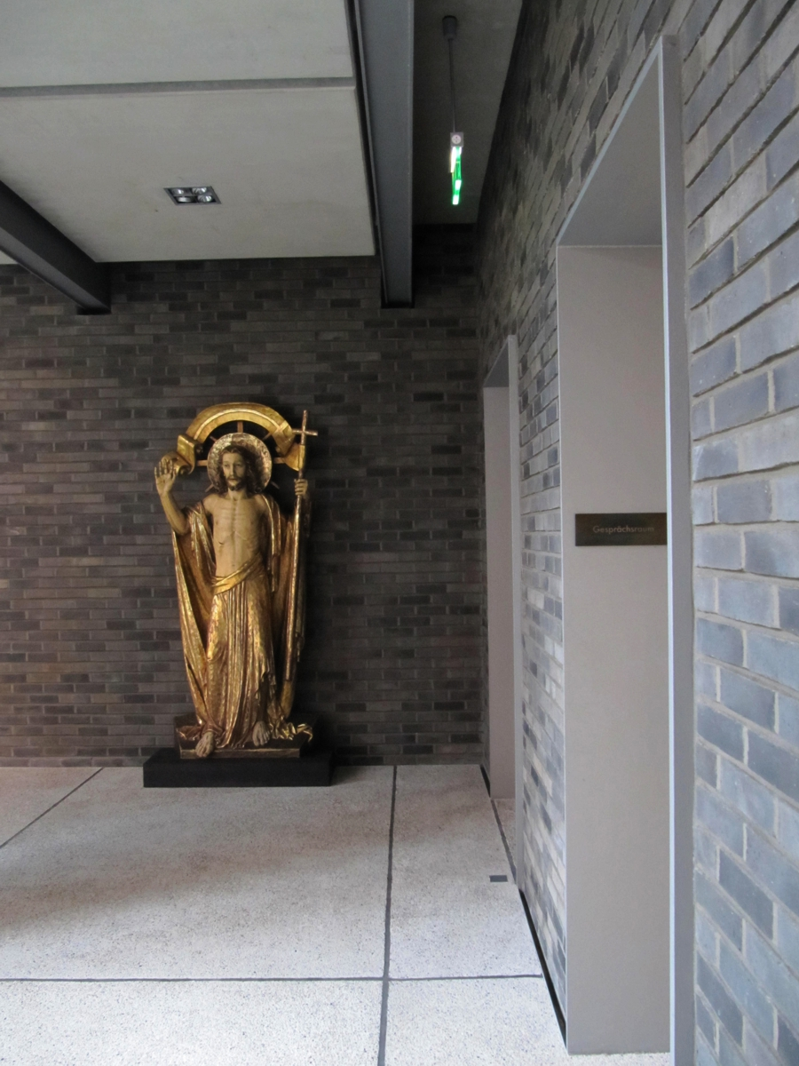 Christusfigur